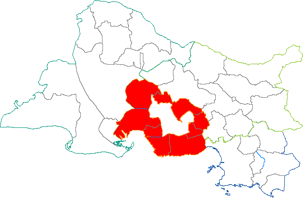 Arrondissement d'Istres